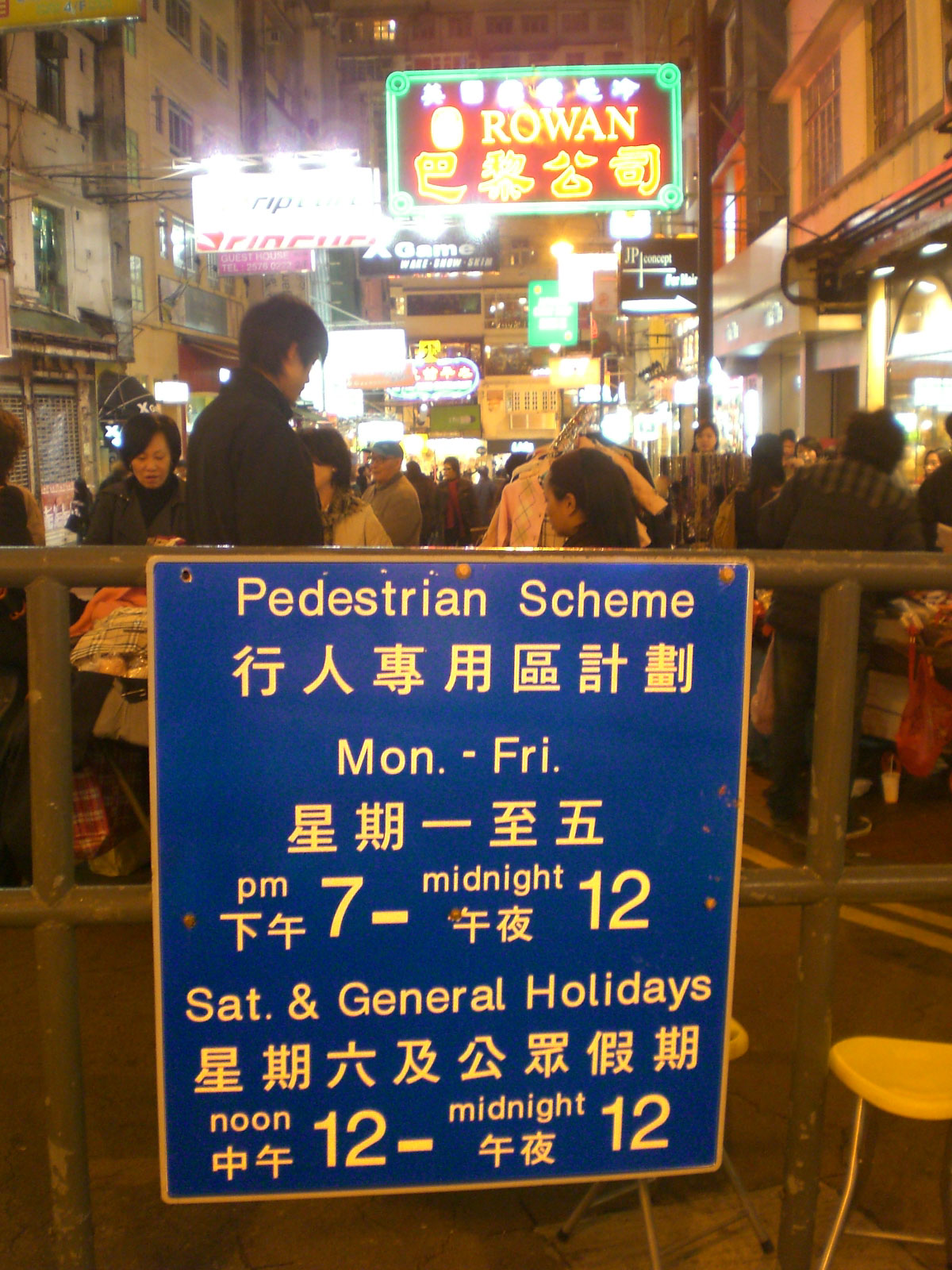 銅鑼灣白沙道步行街